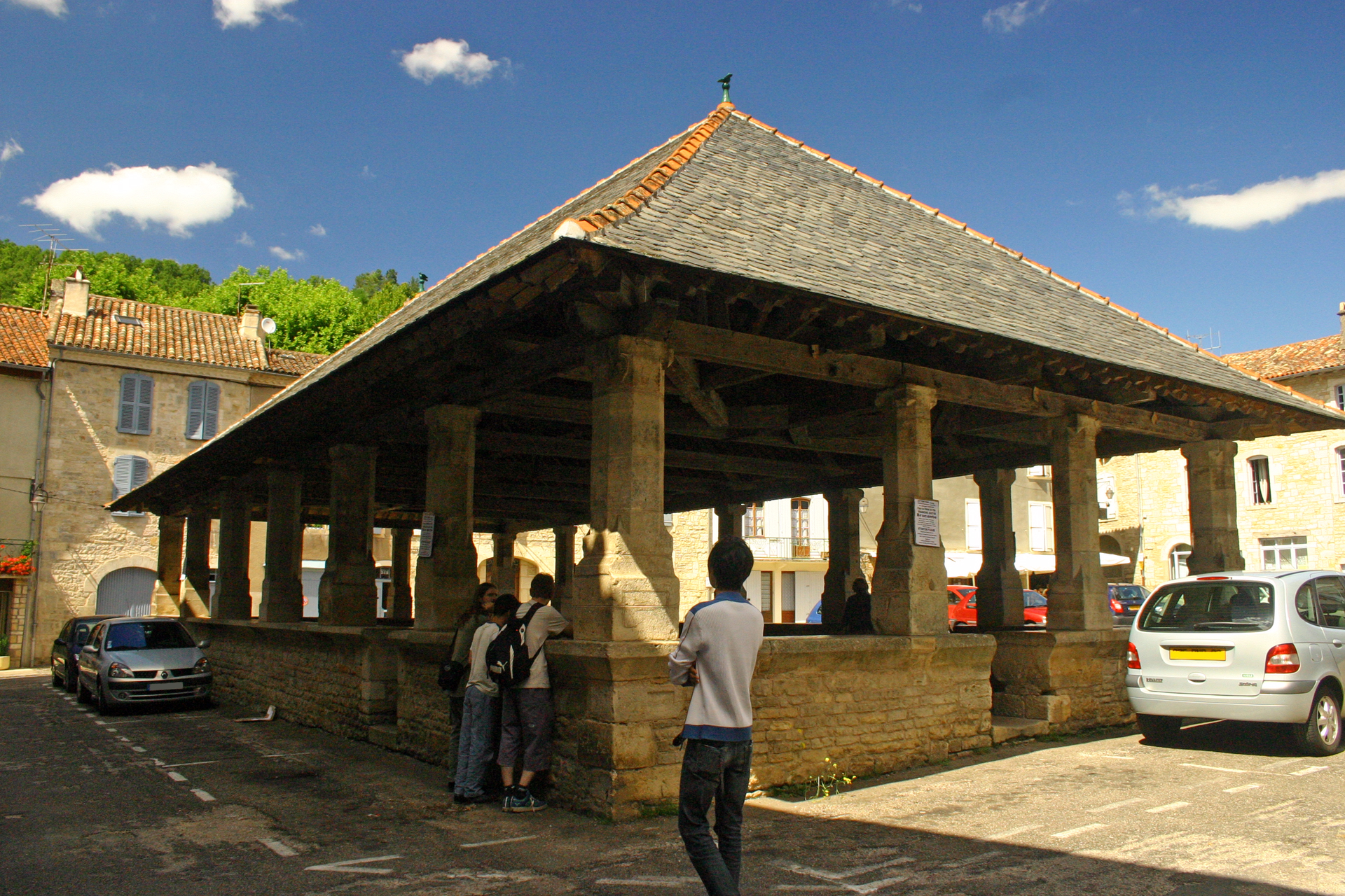 Halles de Caylus (Tarn-et-Garonne, France).